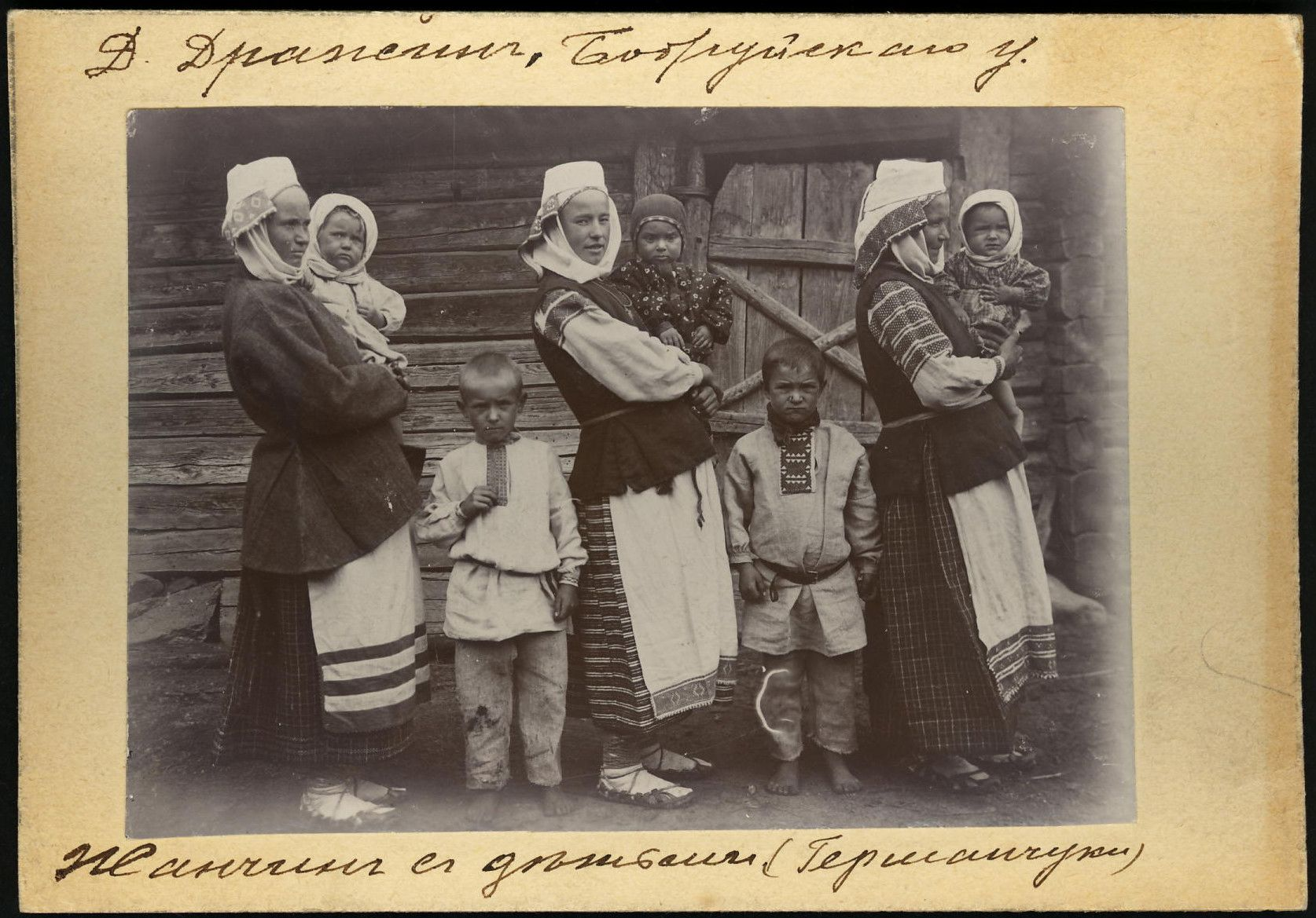 Фотография этнографа Исаака Сербова